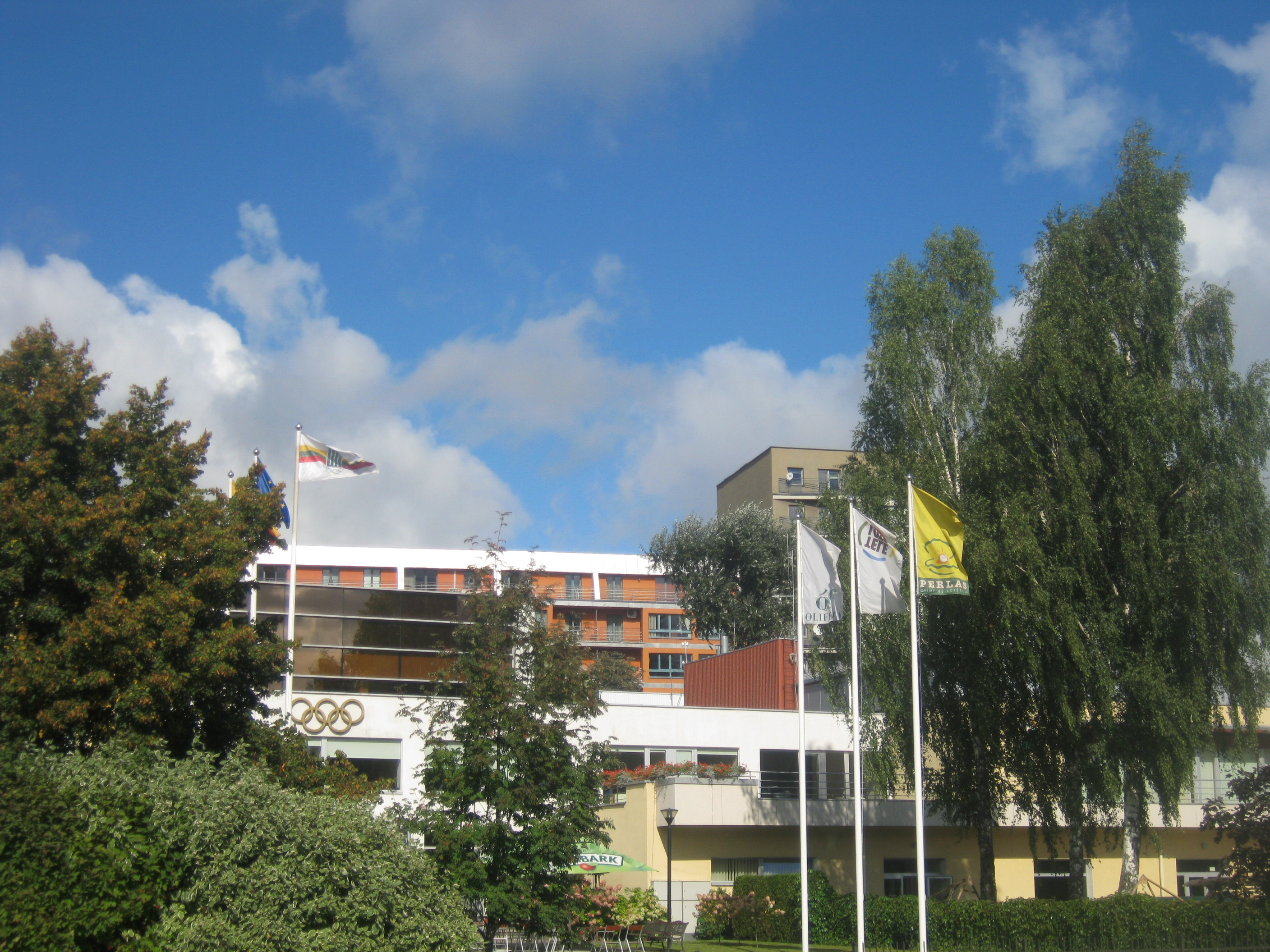 Lietuvos tautinis olimpinis komitetas